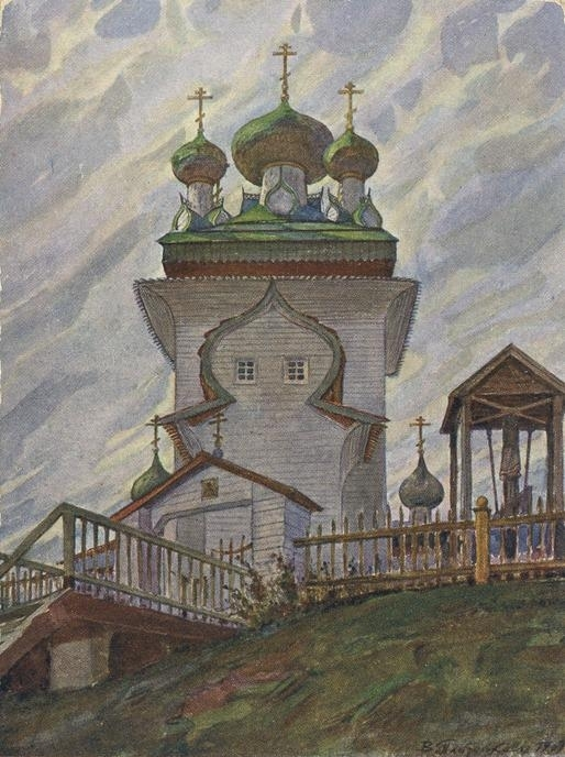 Церковь Вознесения Христова в селе Кушерека, Архангельской губернии Онежского уезда. Открытка Общества возрождения художественной Руси.